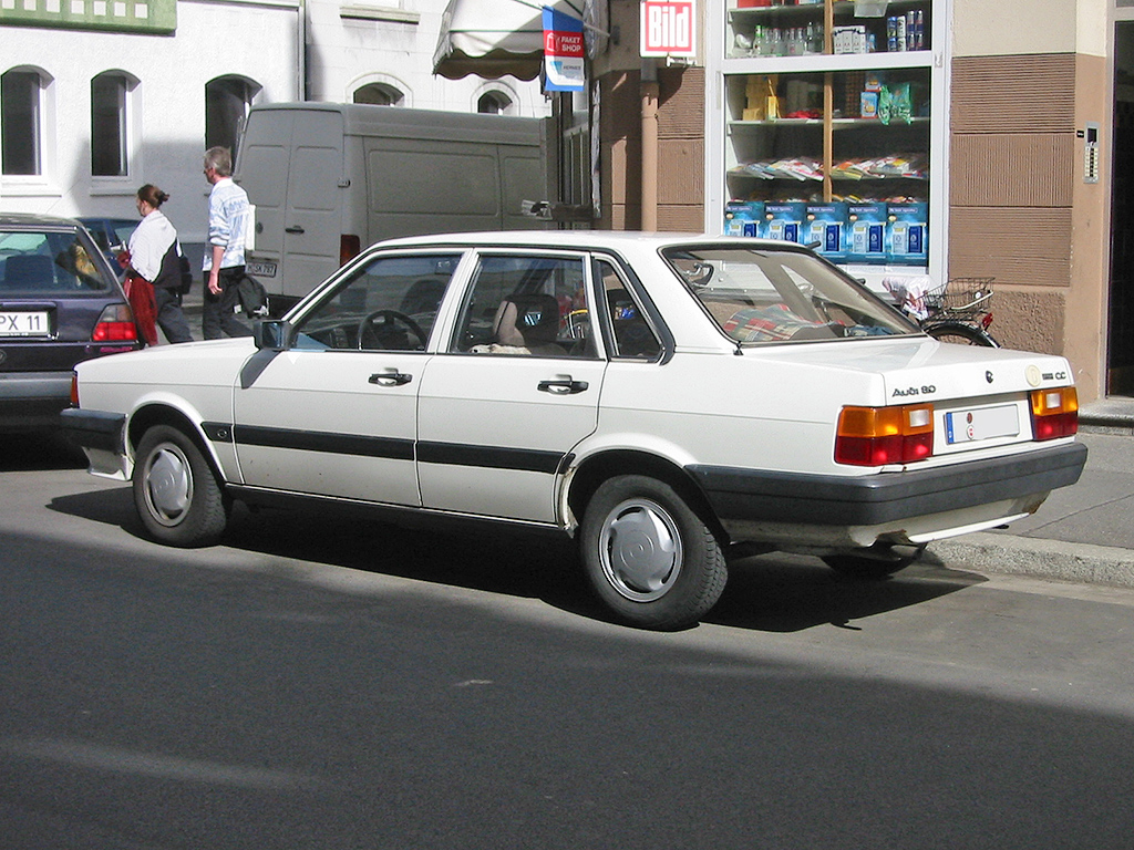 Audi 80 (B2) Facelift